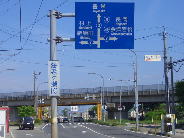 国道7号新潟バイパス(新新バイパス)海老ヶ瀬インターチェンジ。北側から南を向いて撮影。